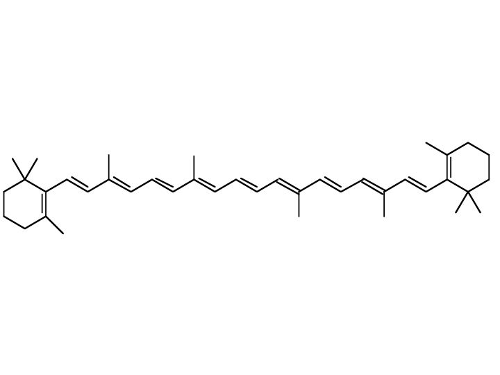 Struttura del β-carotene.